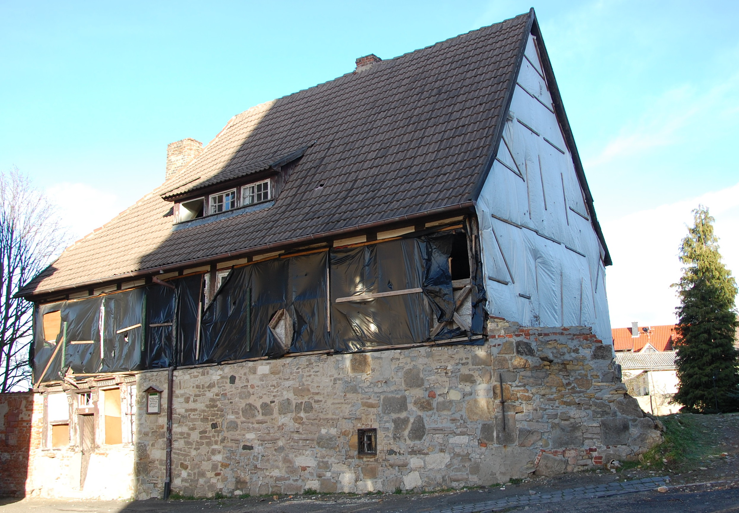 Haus Bergstraße 3 in Gernrode